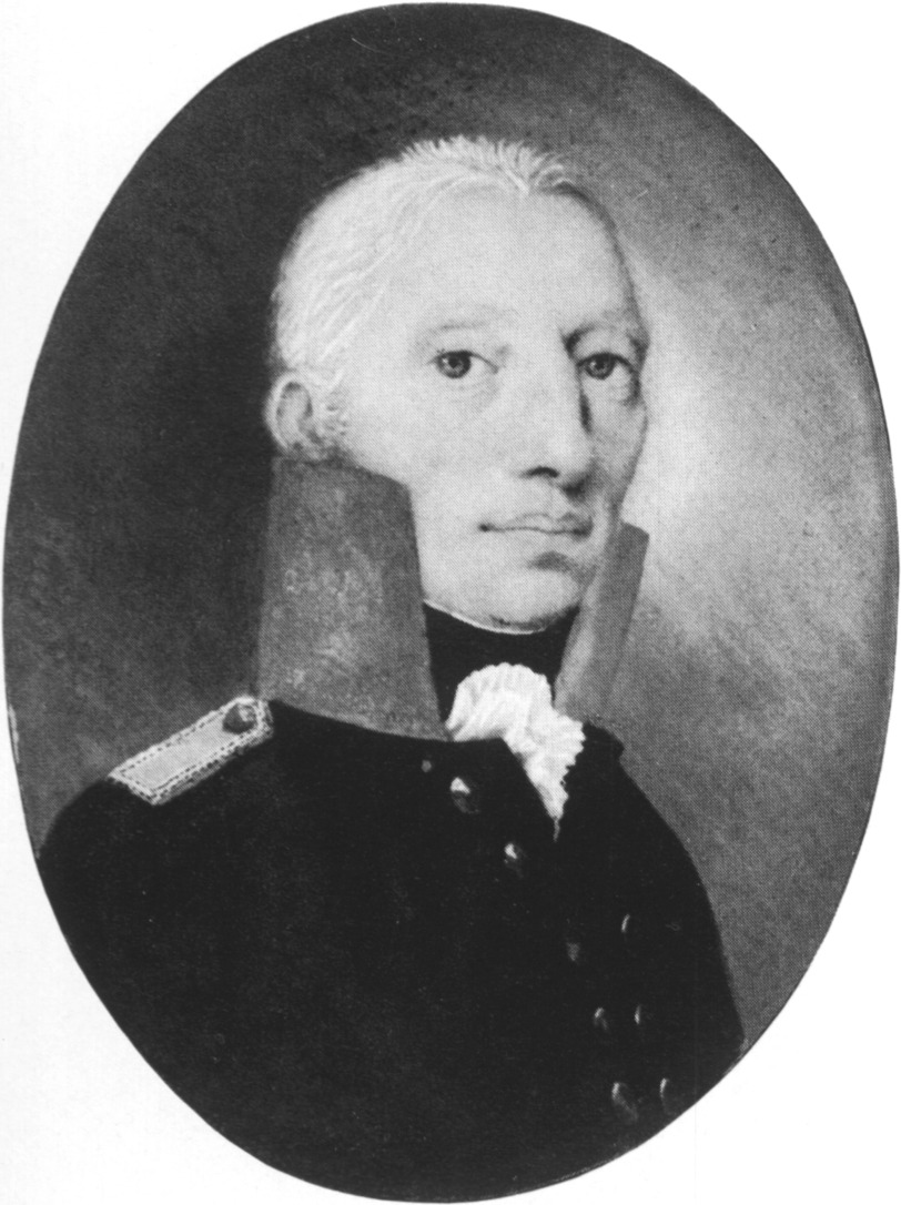 Carl August von Stutterheim (20.09.1759-09.06.1820) Generalmajor